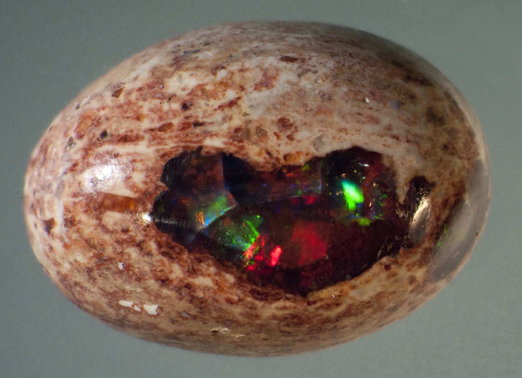 Fire opal from Brasil